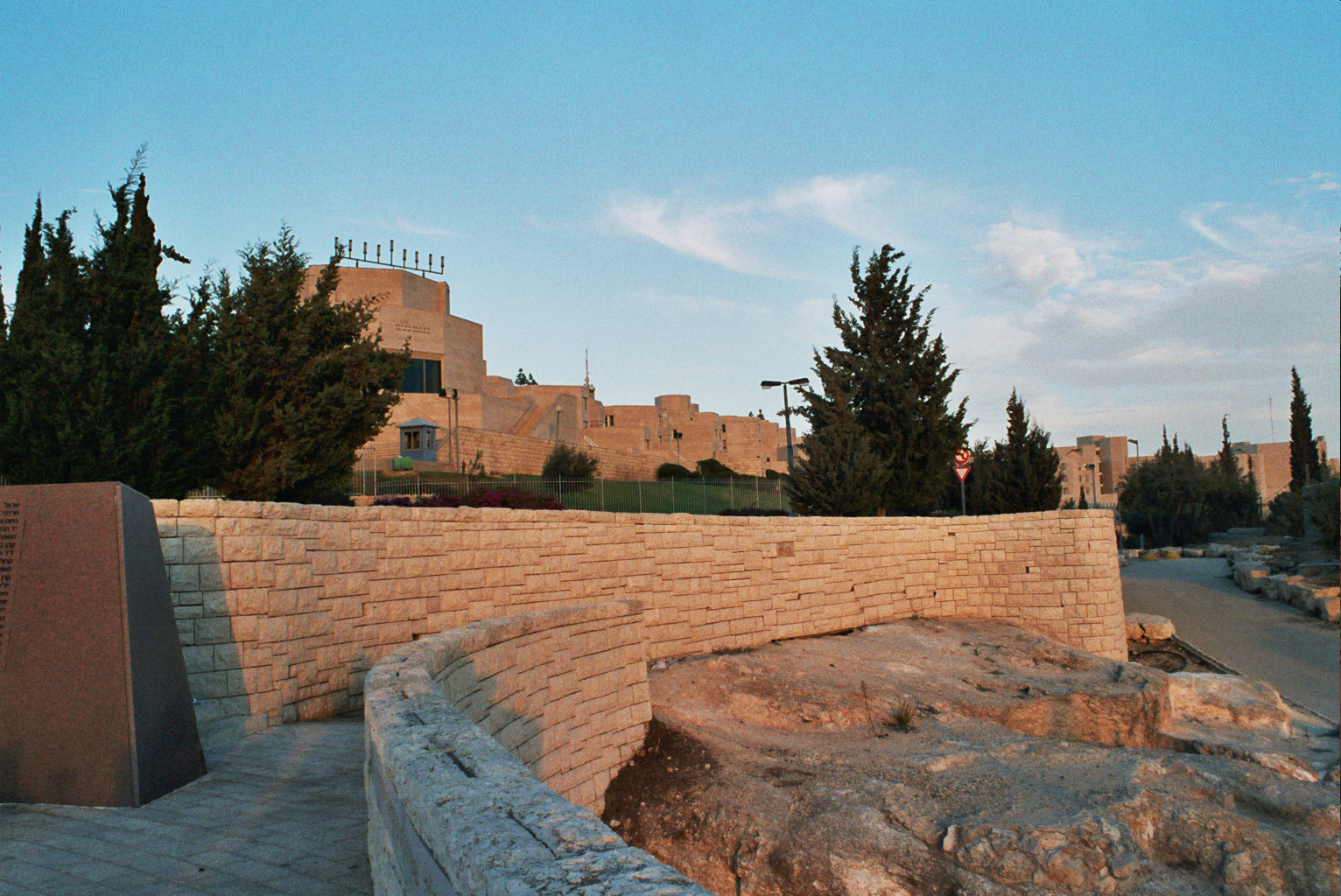 Der Campus der Hebräischen Universität auf dem Scopusberg